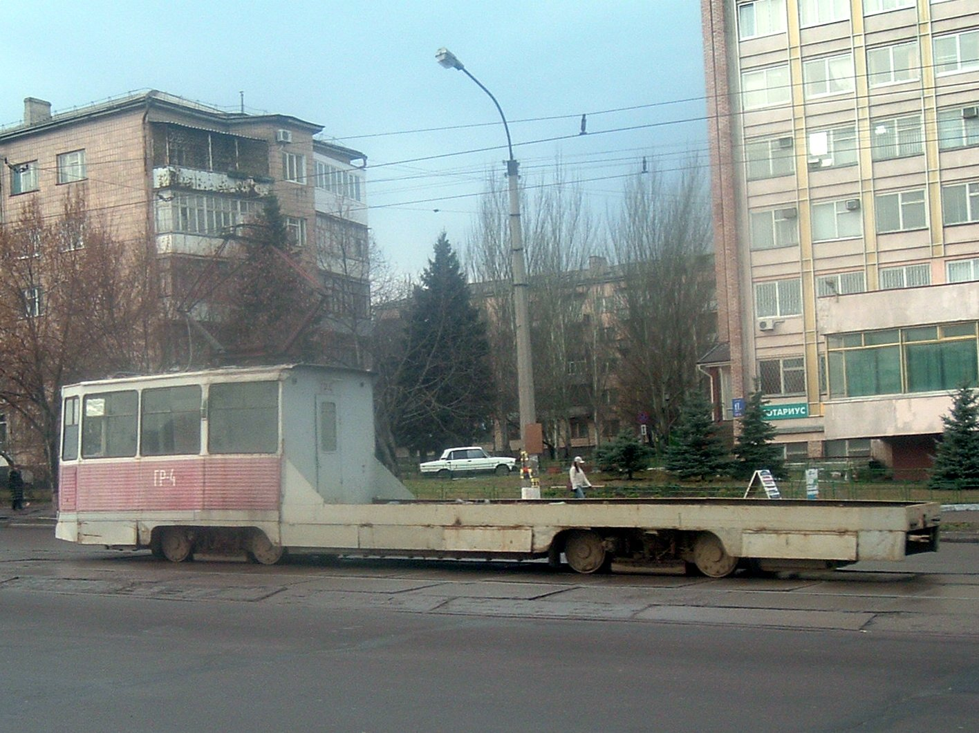 Трамвай на улице Луганска Location: Luhansk, Ukraine